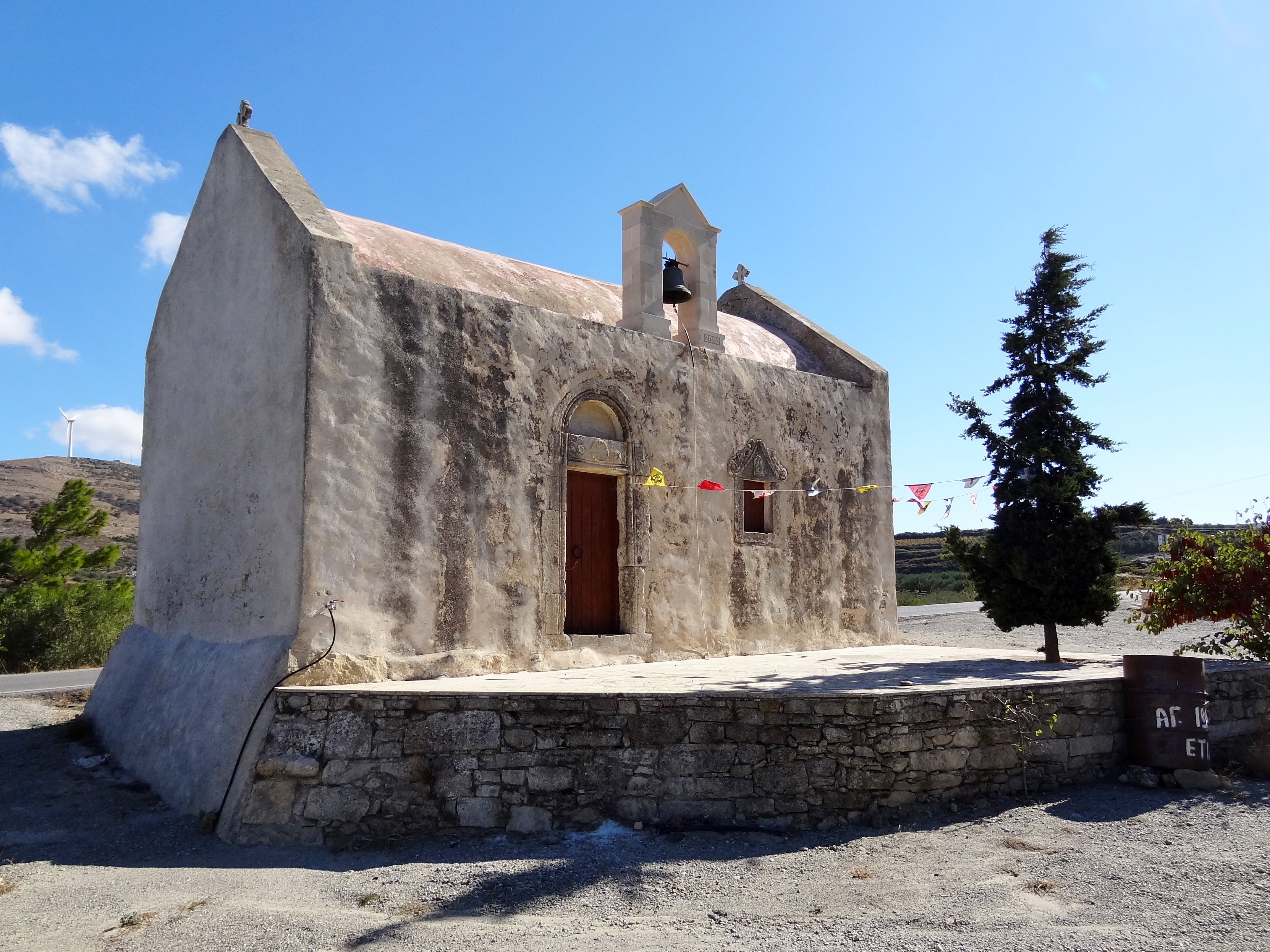 Kirche Agios Ioannis (Άγιος Ιωάννης) in Etia (Ετιά), Gemeinde Sitia, Kreta, Griechenland